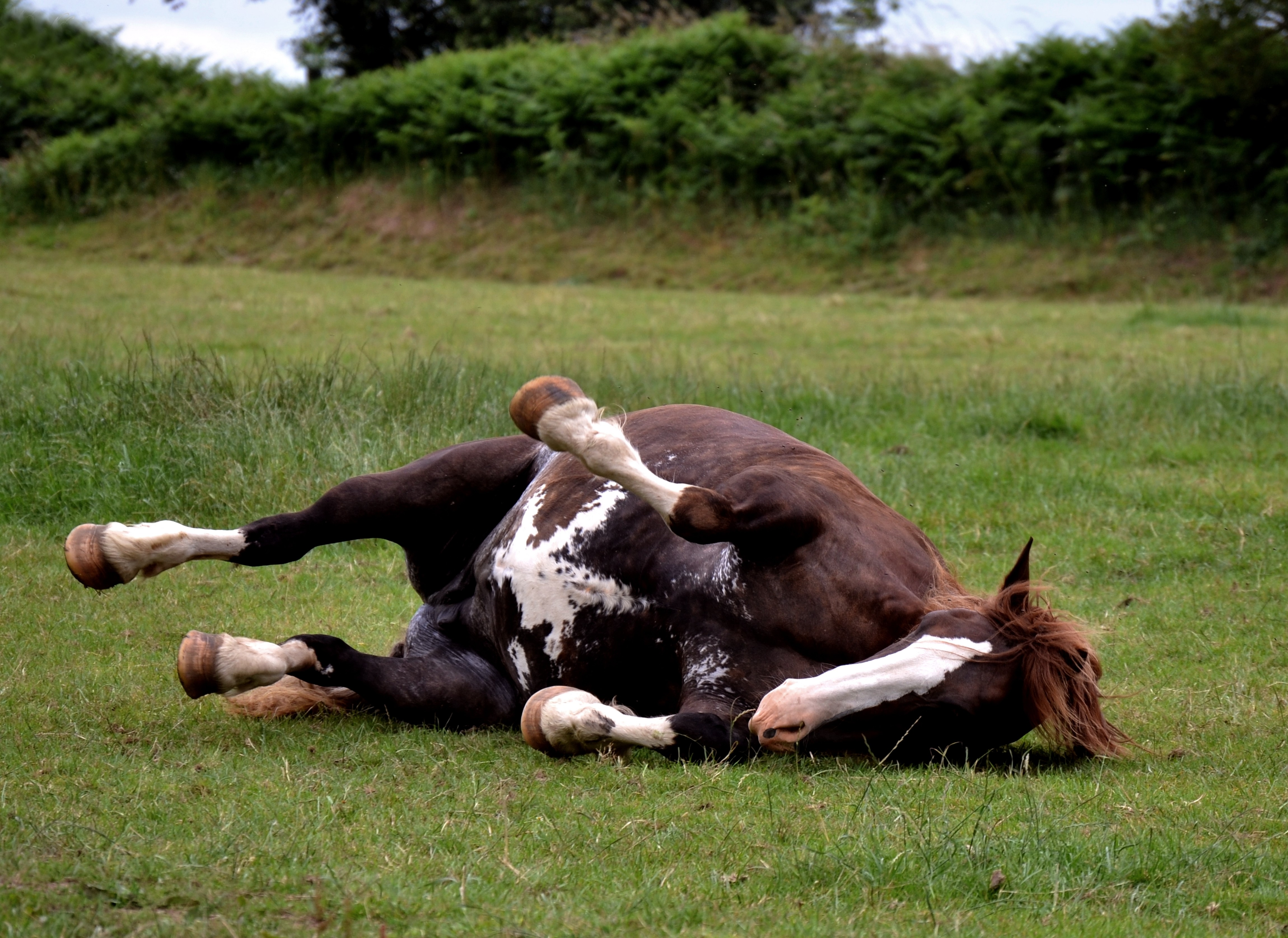 Jument de race bretonne de robe Splash White Overo (SW-1)